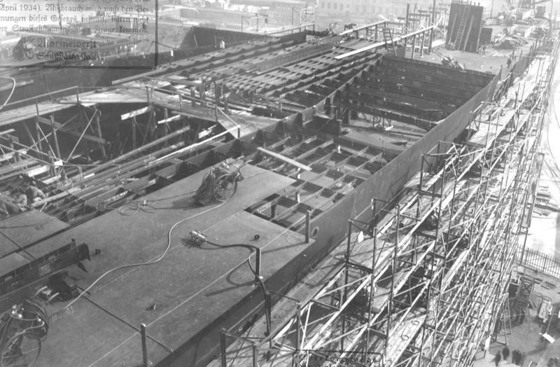 Flugzeugträger "Graf Zeppelin", Bau Flugzeugträger "A". Baustadium Aufgen. am 21.9.1938 Deutsche Werke Kiel [Rückseite mit kyrillischer Beschriftung]